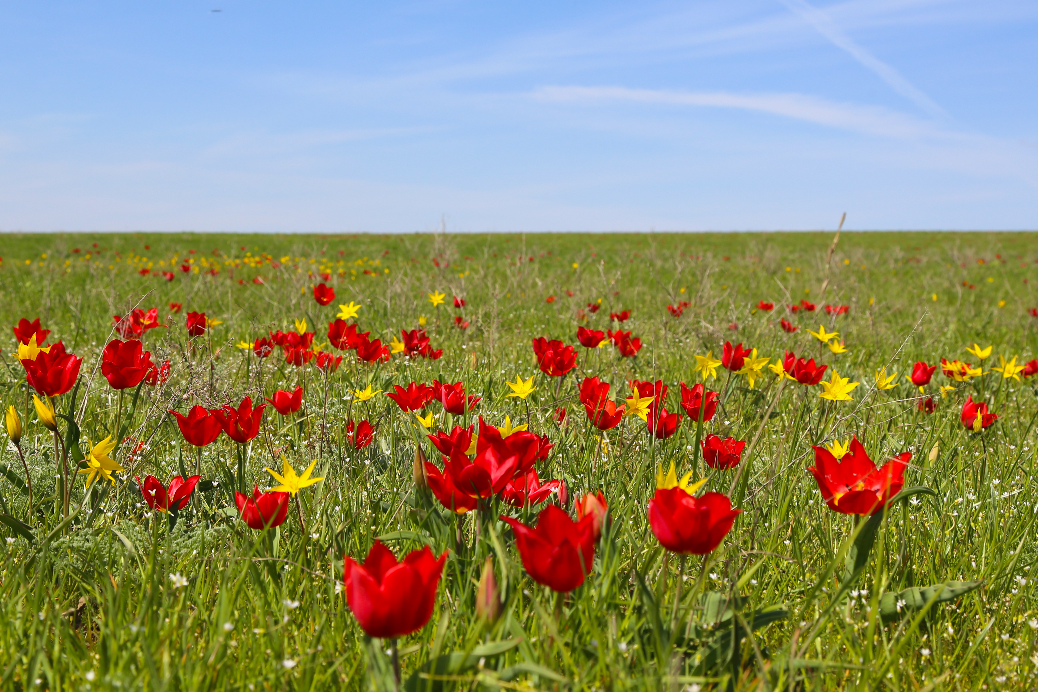 Ростовский заповедник: в центральной части Кума-Манычской впадины, к северу от оз. Маныч-Гудило, в Орловском и Ремонтнеском районах Ростовской области,Орловский район, Ростовская область This image is related to the protected area of Russia number 6100108